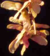 Nærbilled af blade.